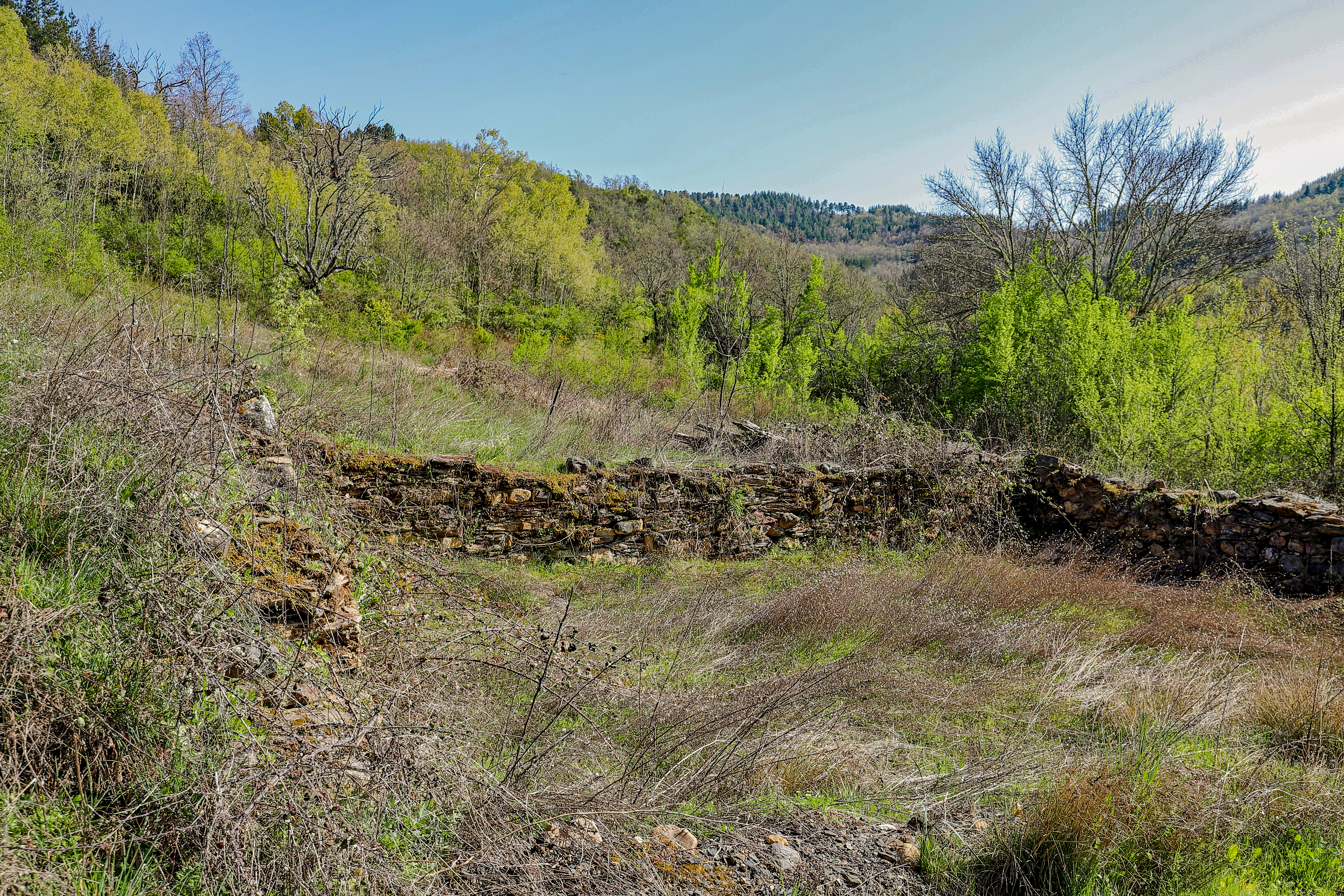 Castellanos es un despoblado que pertenece al municipio de Berlanga del Bierzo en la comarca de El Bierzo, provincia de León.